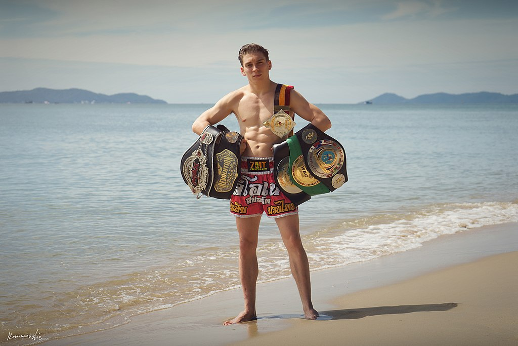 MAthias Gallo Cassarino